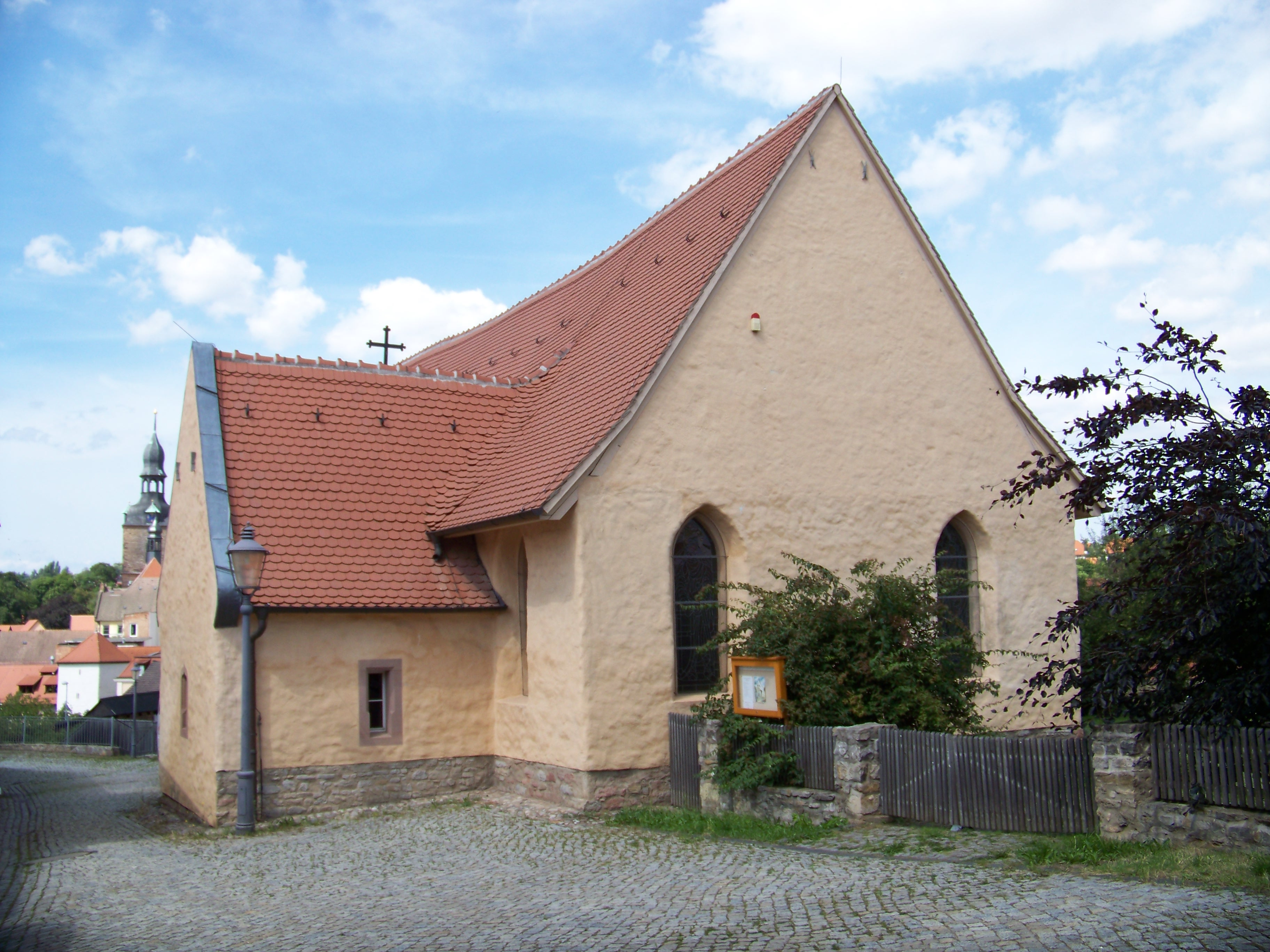 St. Ganglof-Kirche in Hettstedt